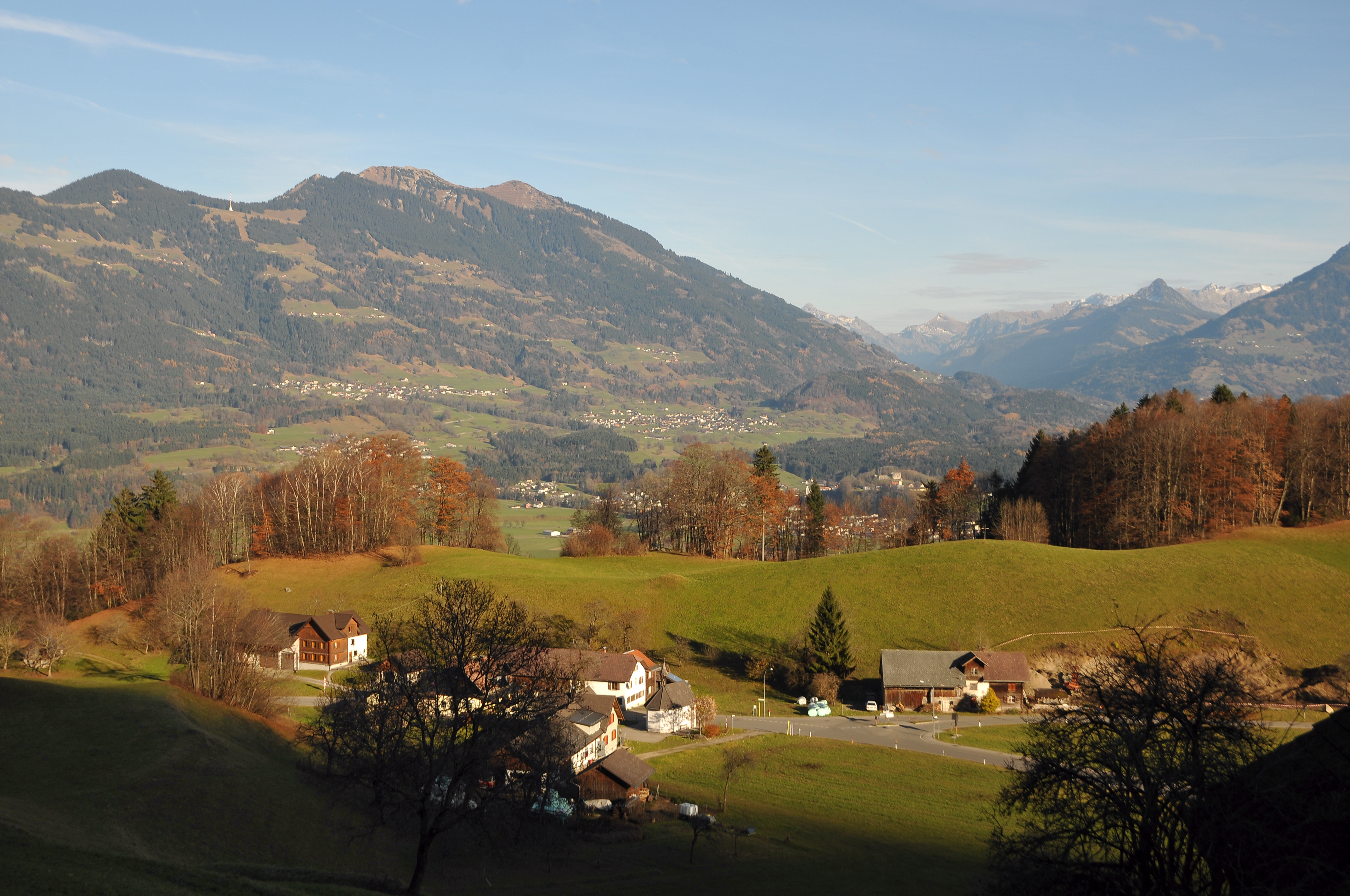 Ortskapelle Mariä Erscheinung zu Lourdes an der Gampelüner Straße 32 in Frastanz. Erbaut 1901.